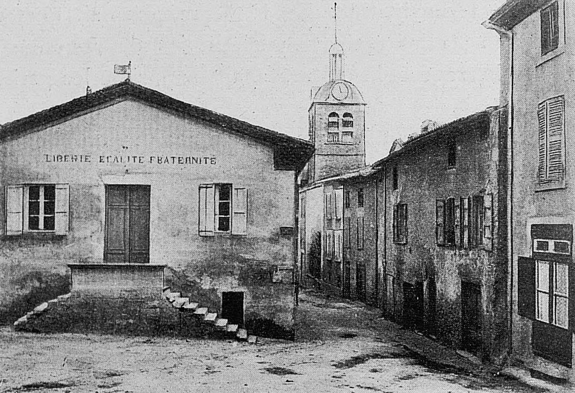 Dictionnaire illustré des communes du département du Rhône. Tome 1 / par MM. E. de Rolland et D. Clouzet.